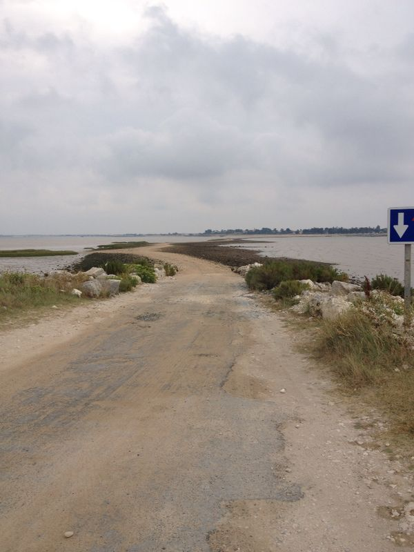 Passe aux boeufs à marée basse, vue depuis l'Ile Madame